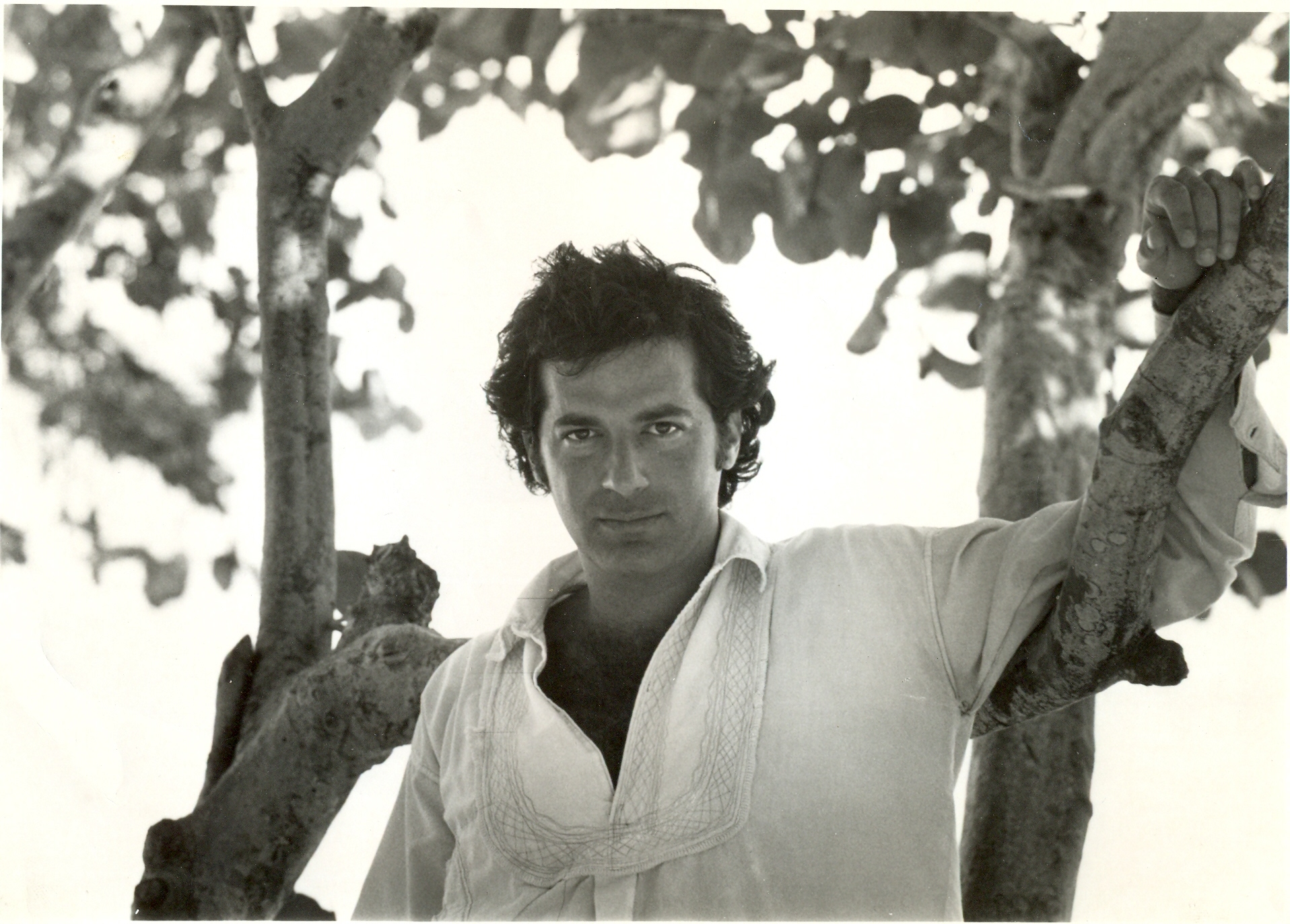 צבי פישמן tzvi fishman